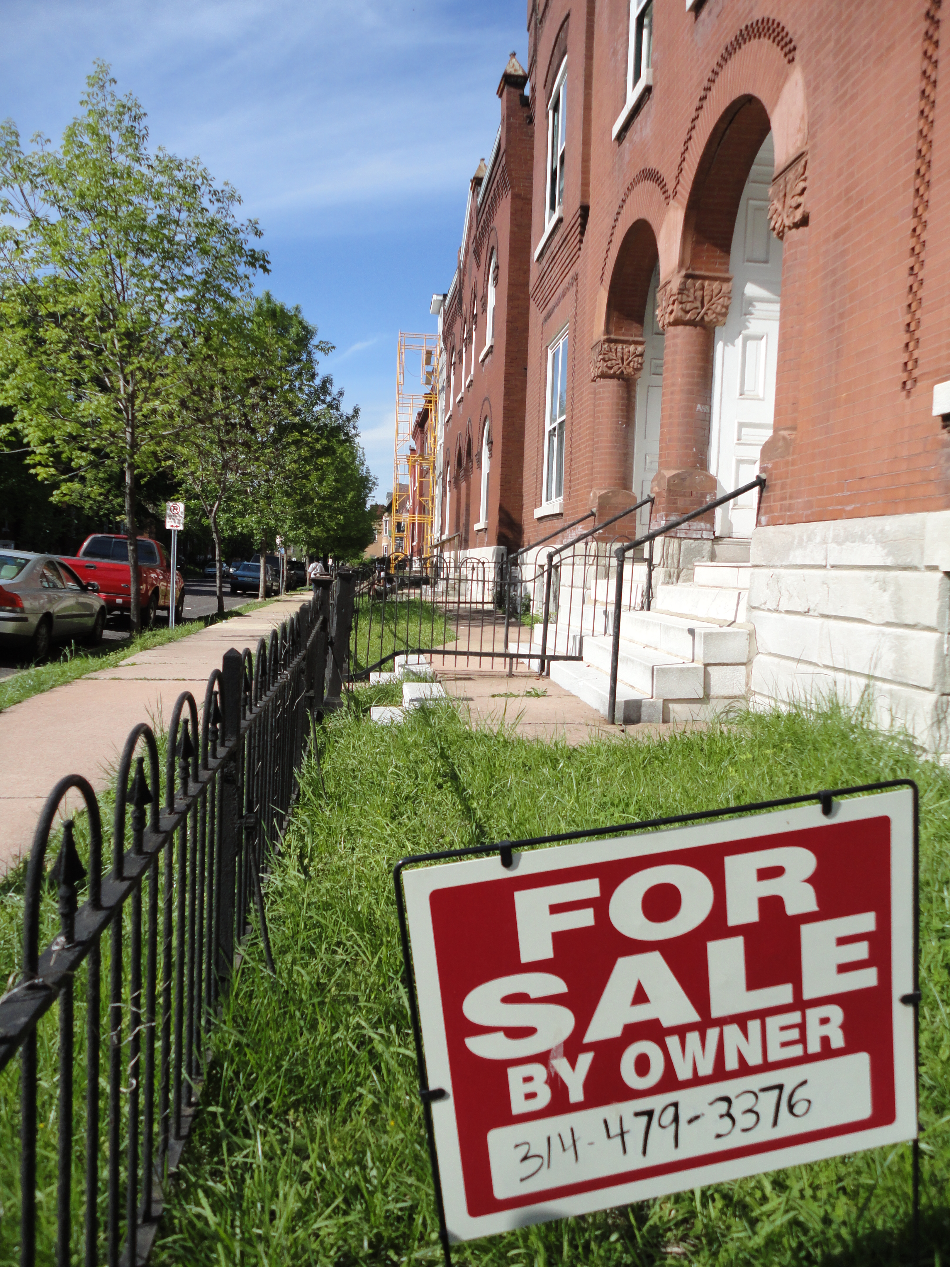 For Sale By Owner